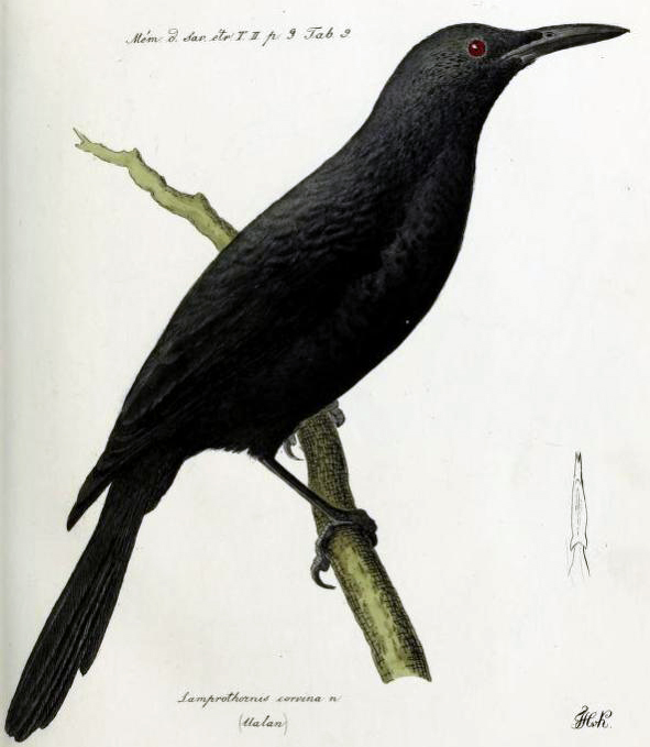 Illustration from Uber einge koch unbeschriebene vogel von der Insel Luzon, Den Carolines und Den Marianen. By von F.H. von Kittlitz. Published in Mémoires présentés à l'Académie Impériale des Sciences de St. Petersbourg par divers Savants et dans ses Assemblées. Tome 2: 7-8. (1831))